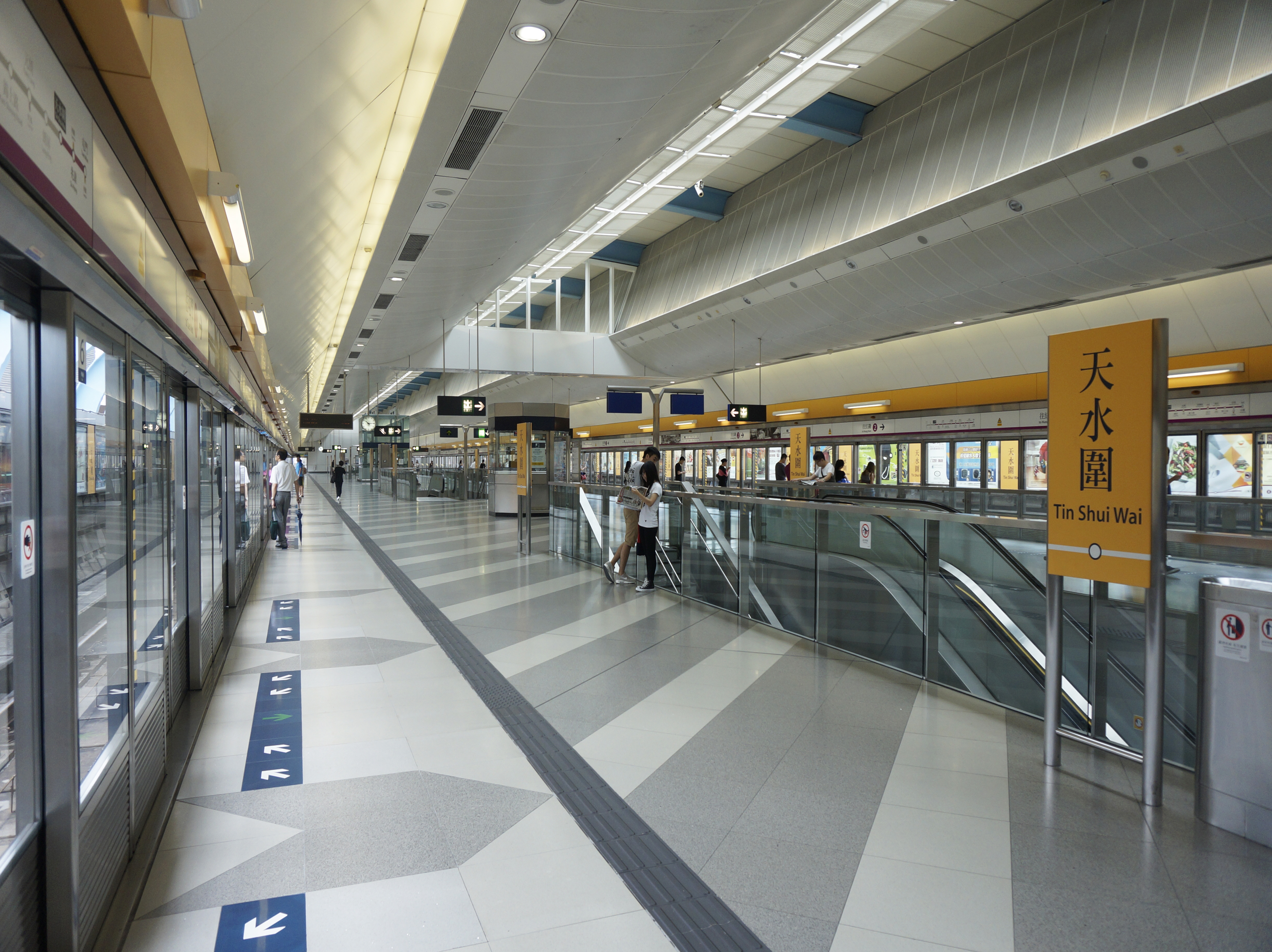 港鐵天水圍站月台